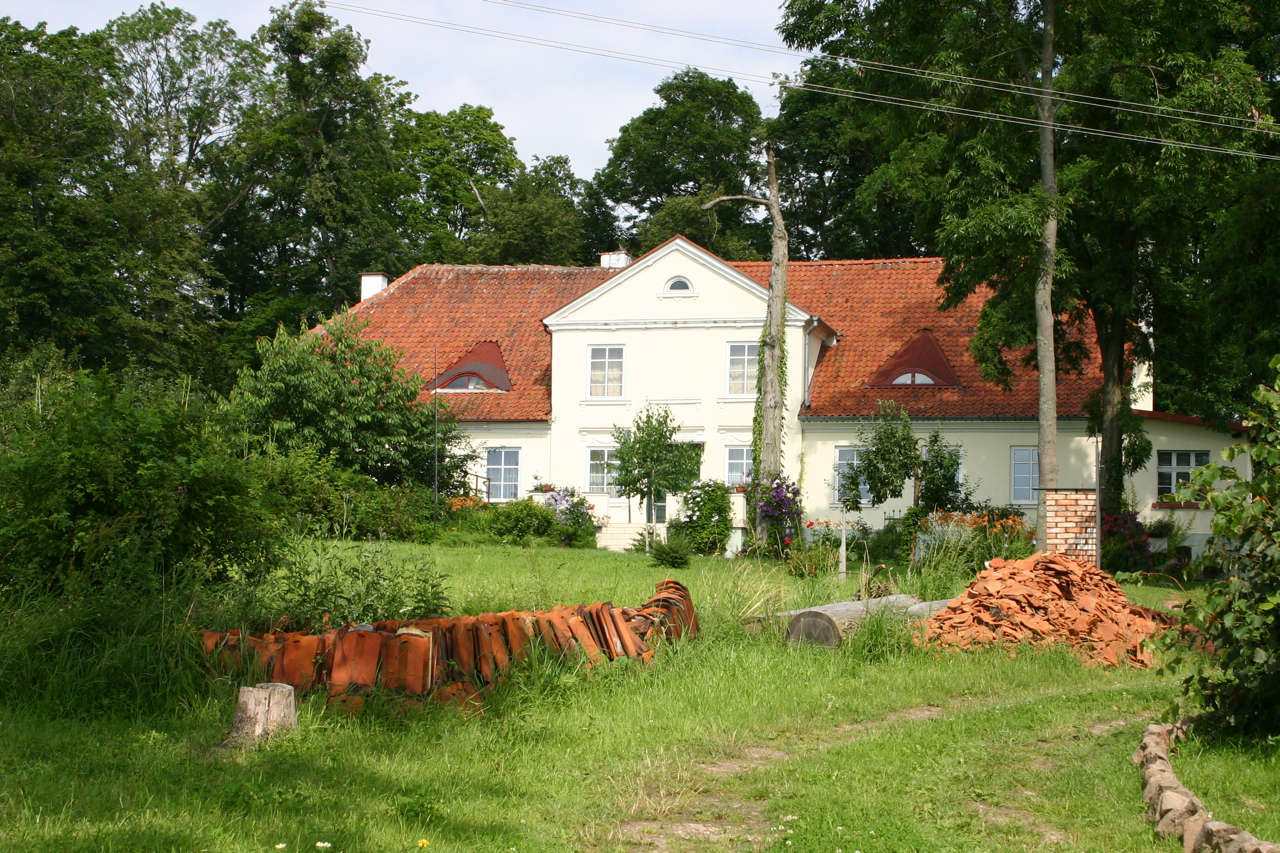 Muławki - dwór z ok. 1880 (zabytek nr 2979 z 29.03.1999)